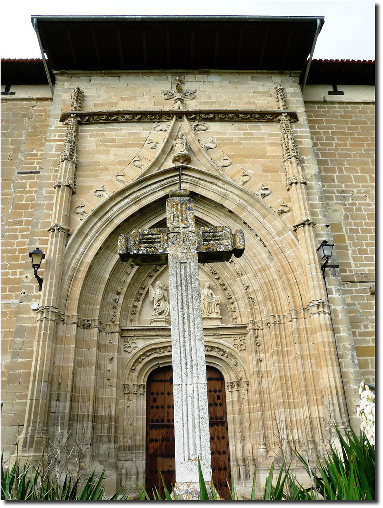 Estabeluko San Martin eliza.